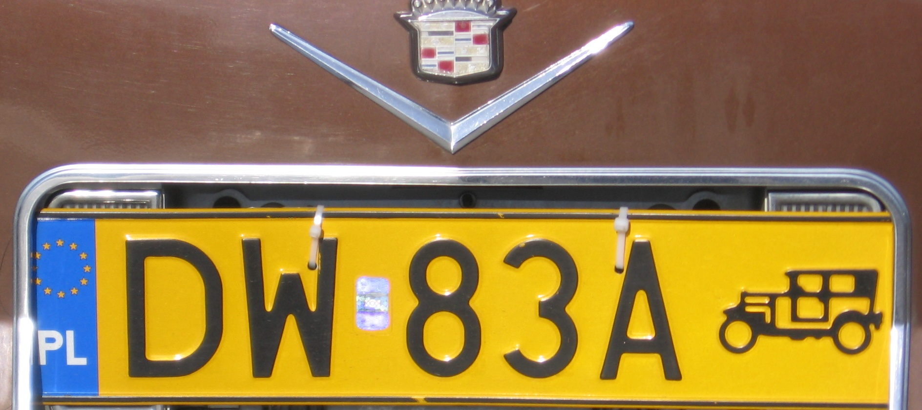 Cadillac oldtimer we Wrocławiu, polska tablica rejestracyjna wersja "europejska"